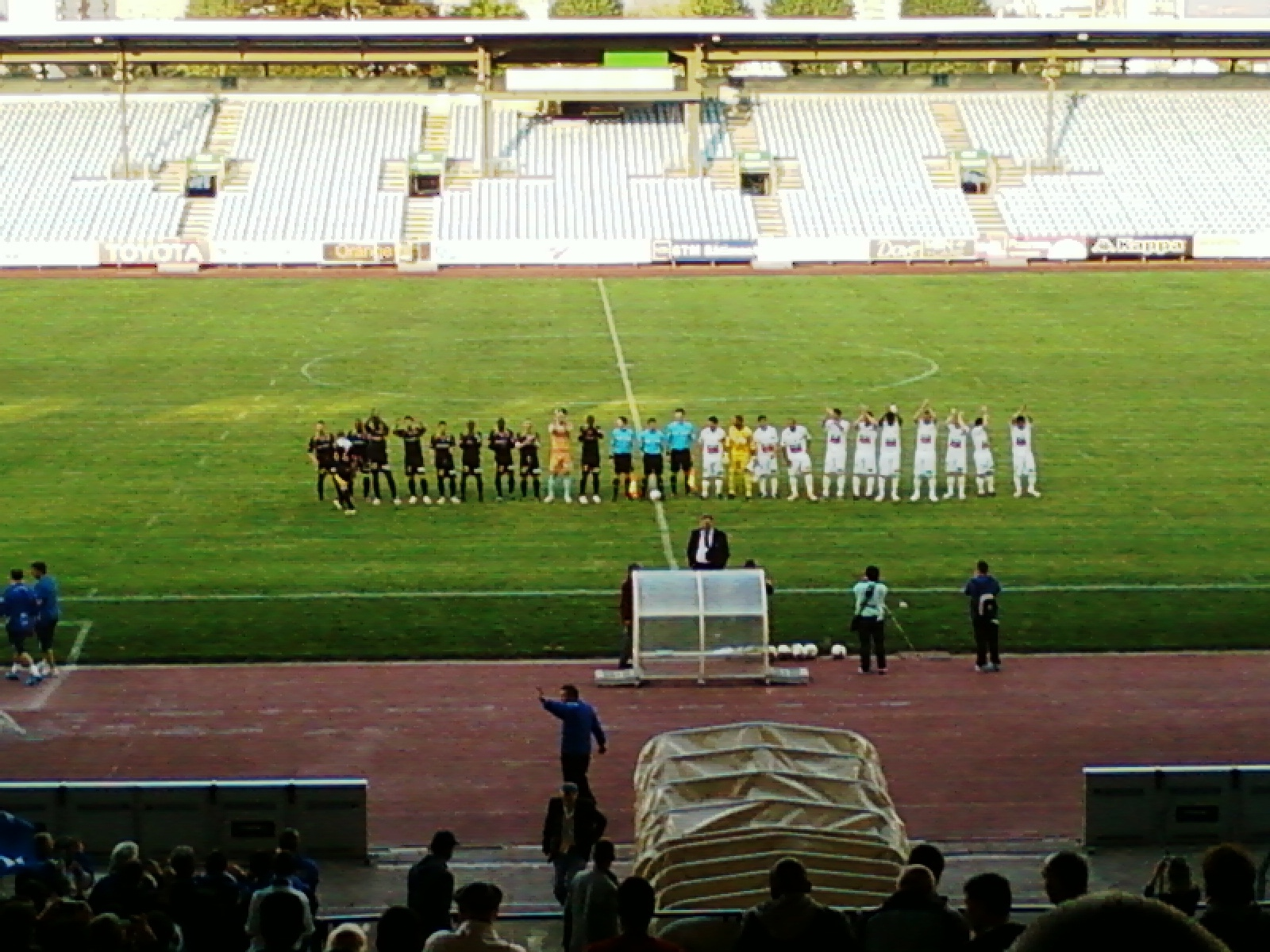 Présentation des équipes lors du match UJA Alfortville - SC Bastia du 30 avril 2011